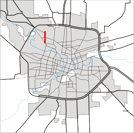 Marcación de la avenida Rodriguez del Busto